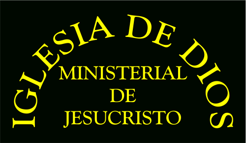 Iglesia de Dios Ministerial de Jesucristo